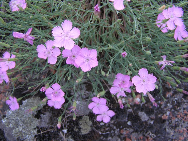 OLYMPUS IMAGING CORP.